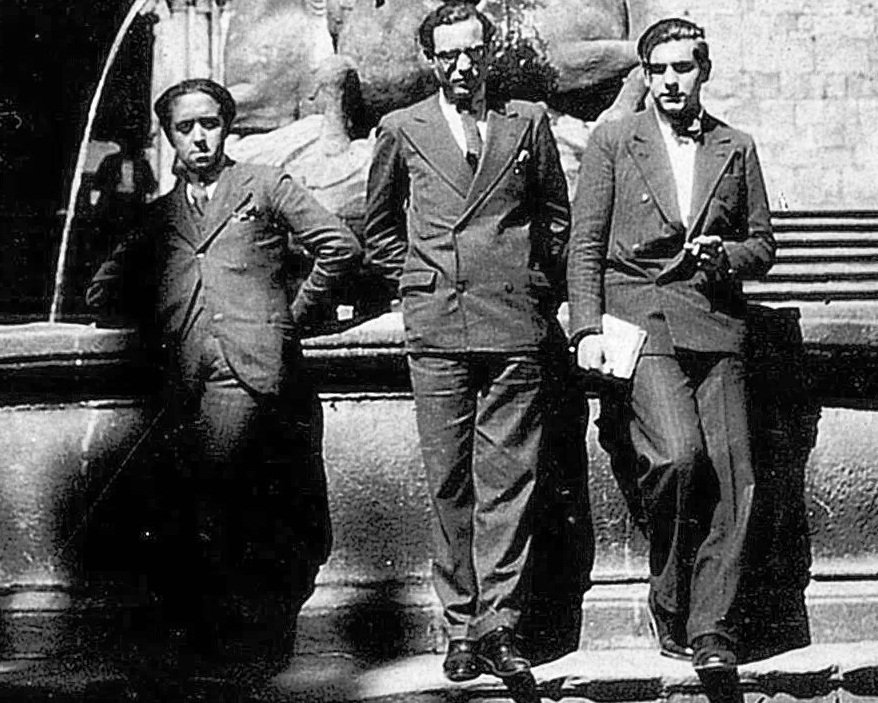 Luís Manteiga, Héctor Raurich e Luís Seoane en Santiago de Compostela en 1930